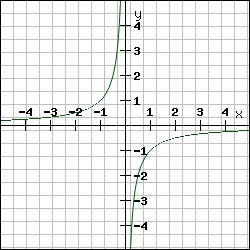 Hiperbola negativa